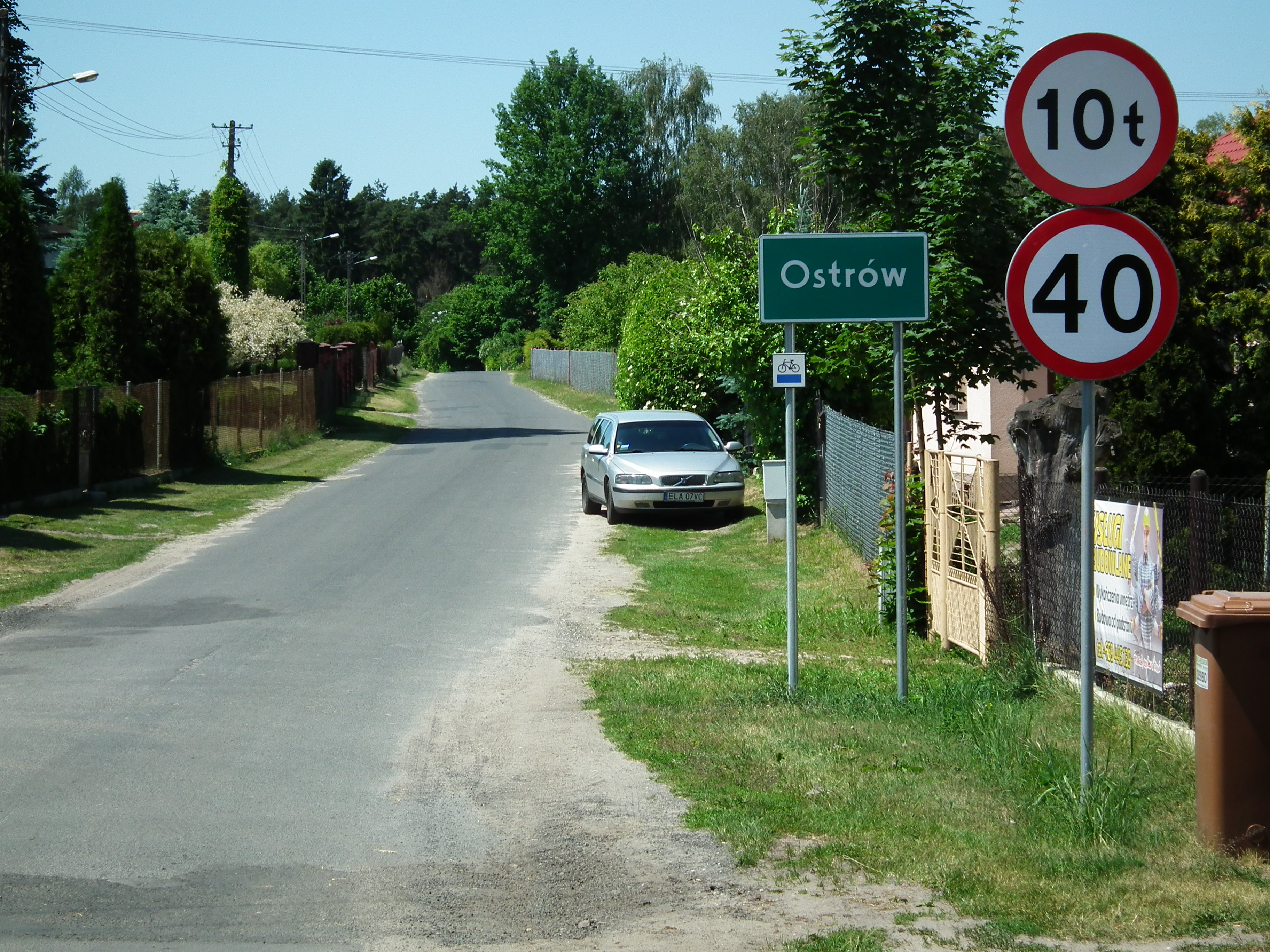 Ostrów koło Kolumny.